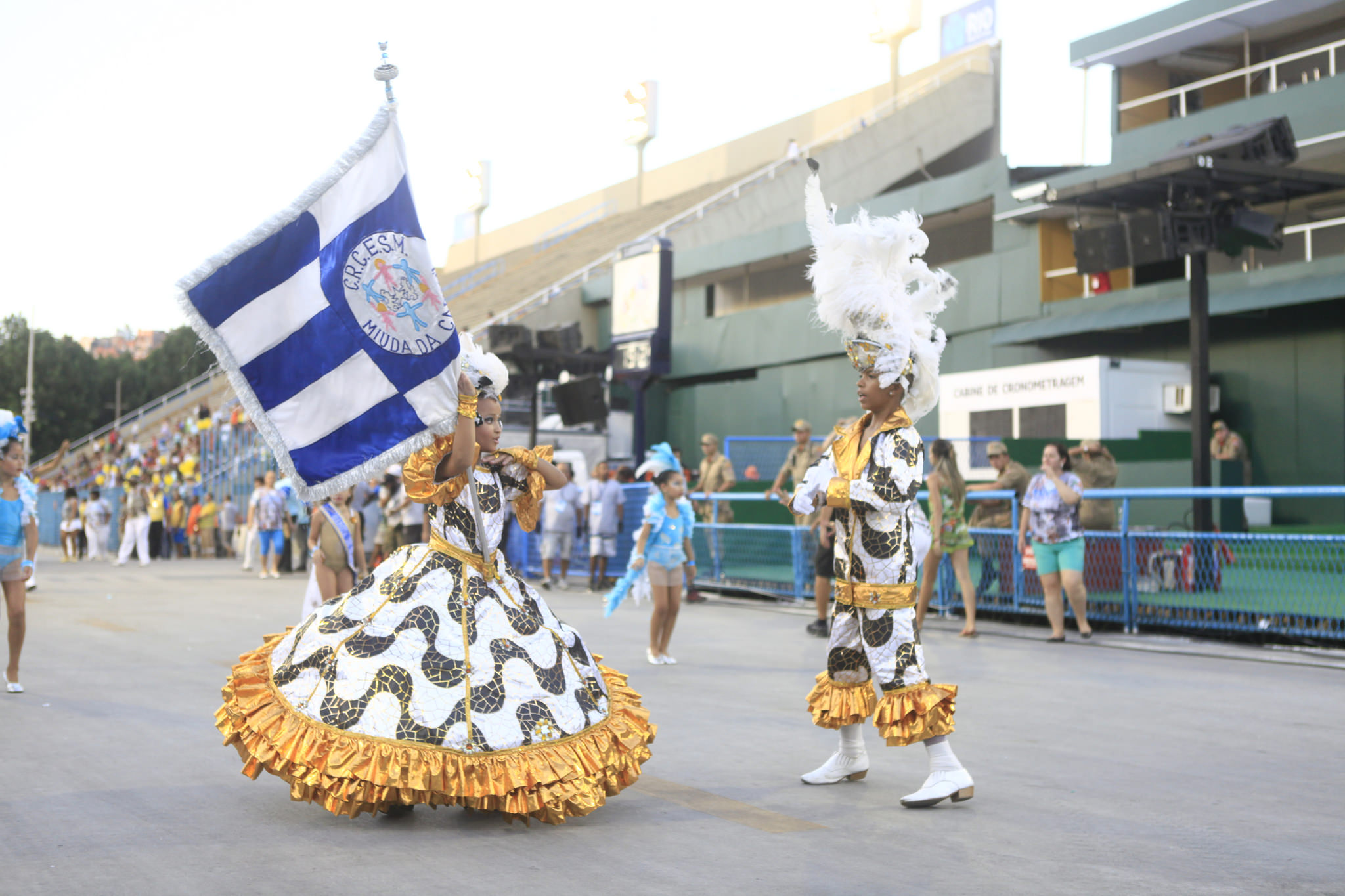 Rio de Janeiro - Pequenos sambistas fecham desfiles na Marquês de Sapucaí.